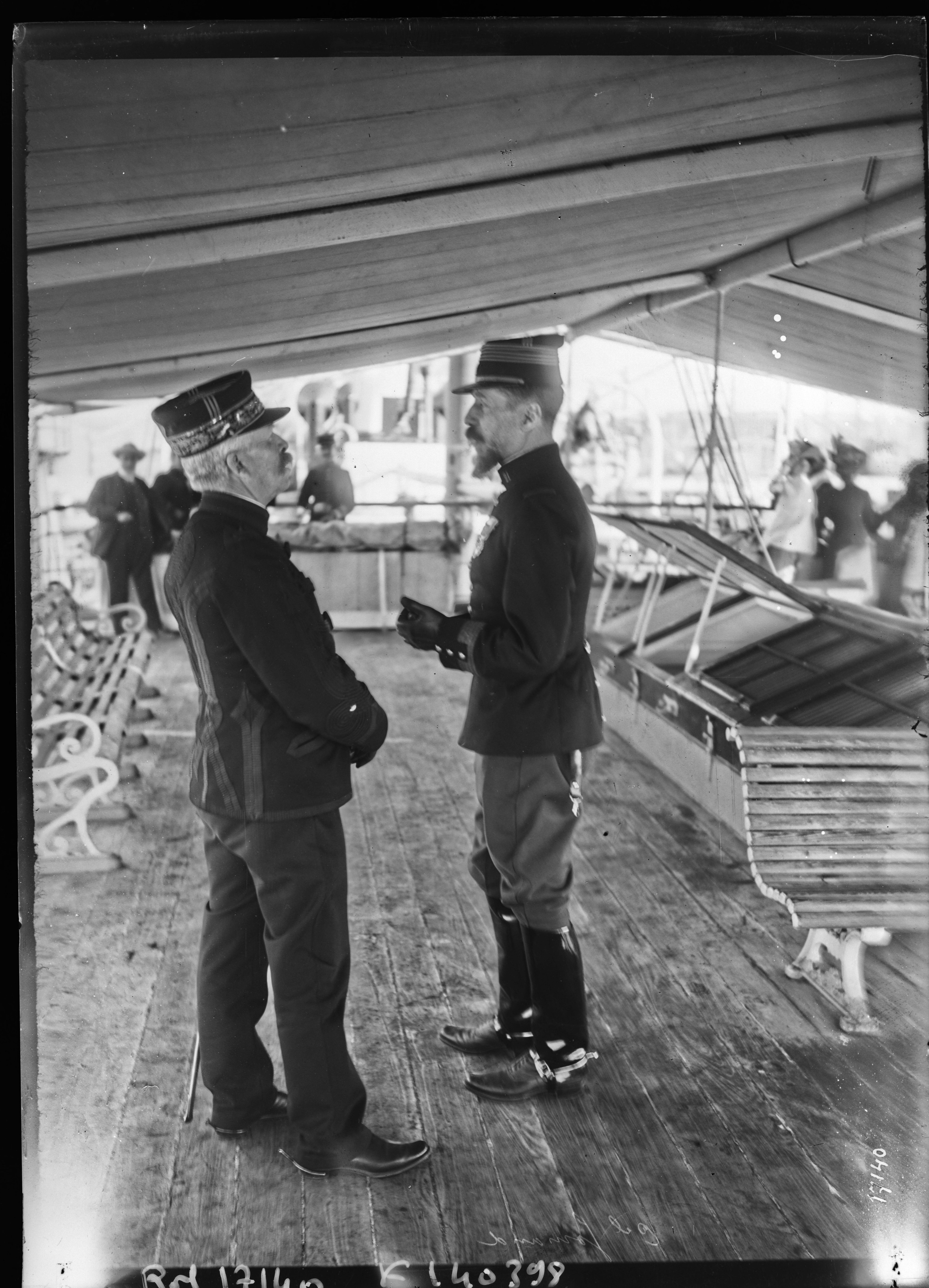 Colonel Gouraud [commandant du 1er régiment d'infanterie coloniale, embarquant avec ses troupes à Marseille à destination du Maroc, le 28 avril 1911] : [photographie de presse] / [Agence Rol] photogr. nég. sur verre ; 13 x 18 cm (sup.)